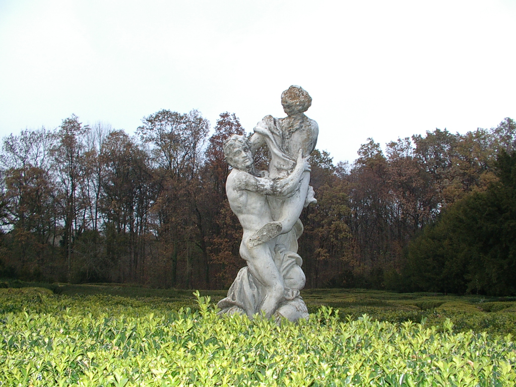 Andrássy-kastély parkja, Leányszöktetés (Fadrusz János (tervező), mészkő, 1885 és 1903 között) [1]